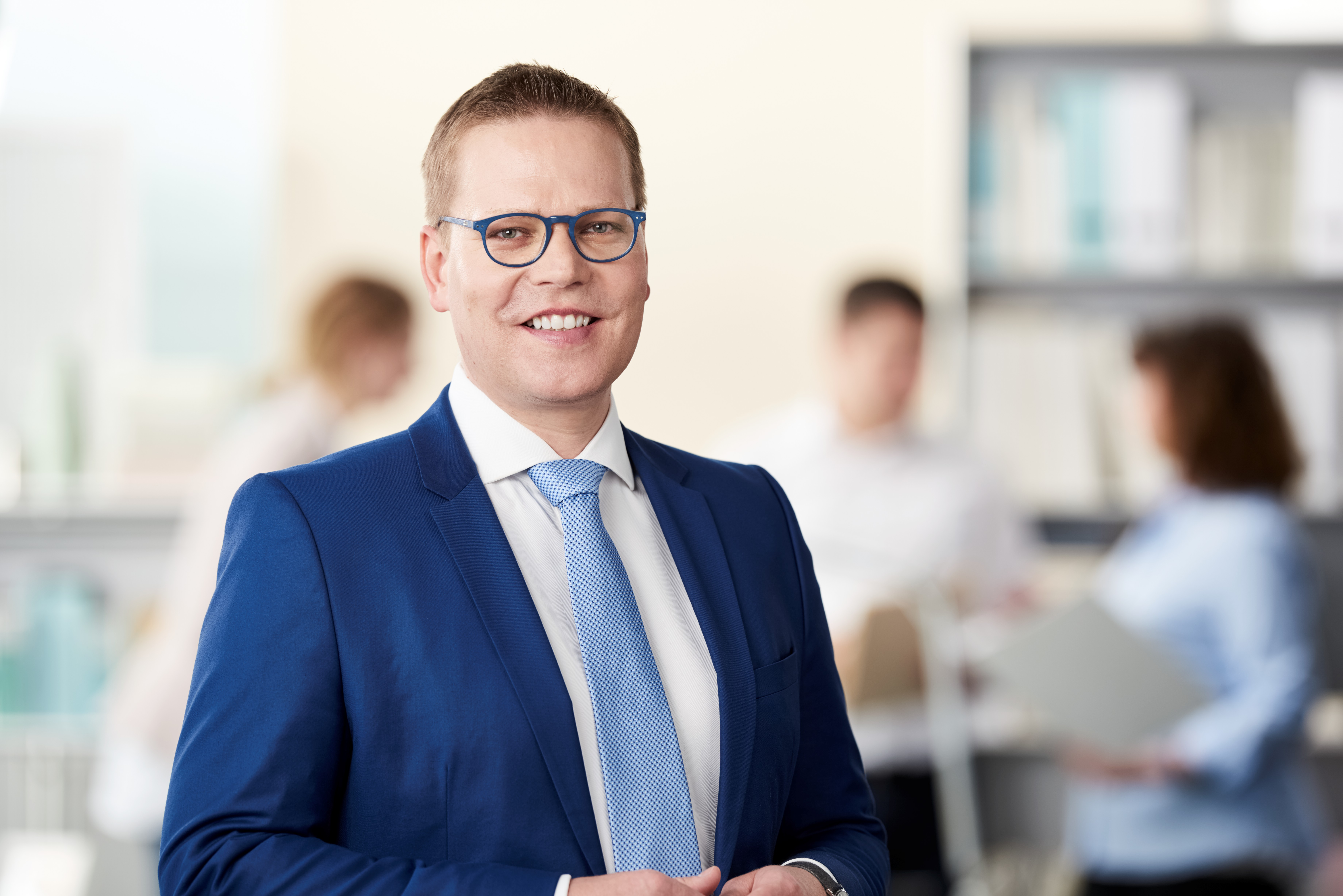 Tino Sorge MdB by Jan Kopetzky